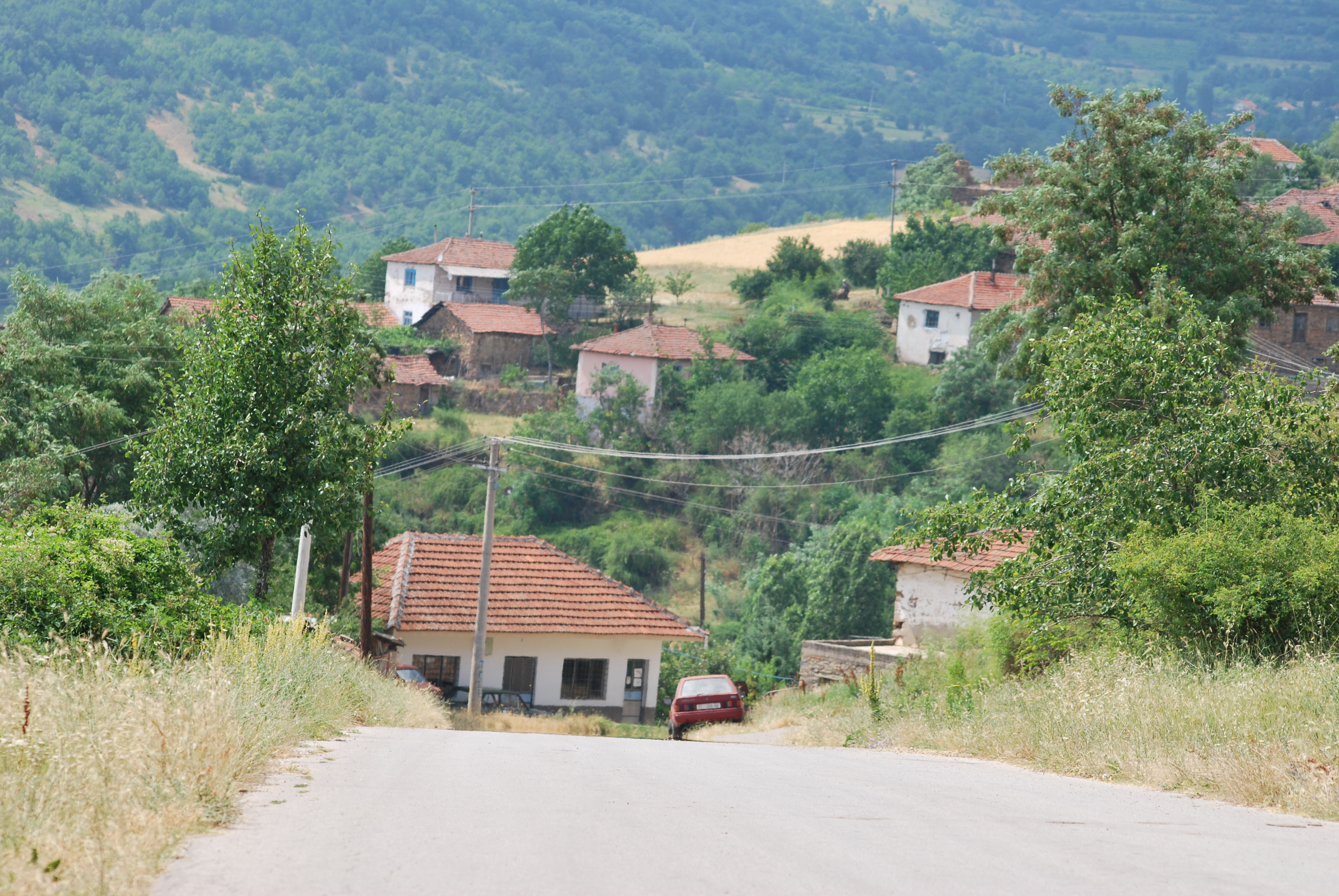 Dreveno, Macedonia